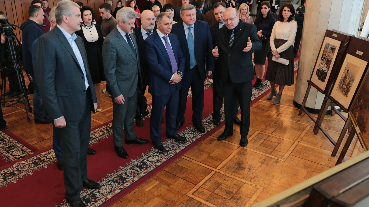 А. В. Мальгин комментирует экспозицию для руководства Крыма (Аксёнов, Константинов и др) во время коллегии Министерства культа РК, 4 марта 2020